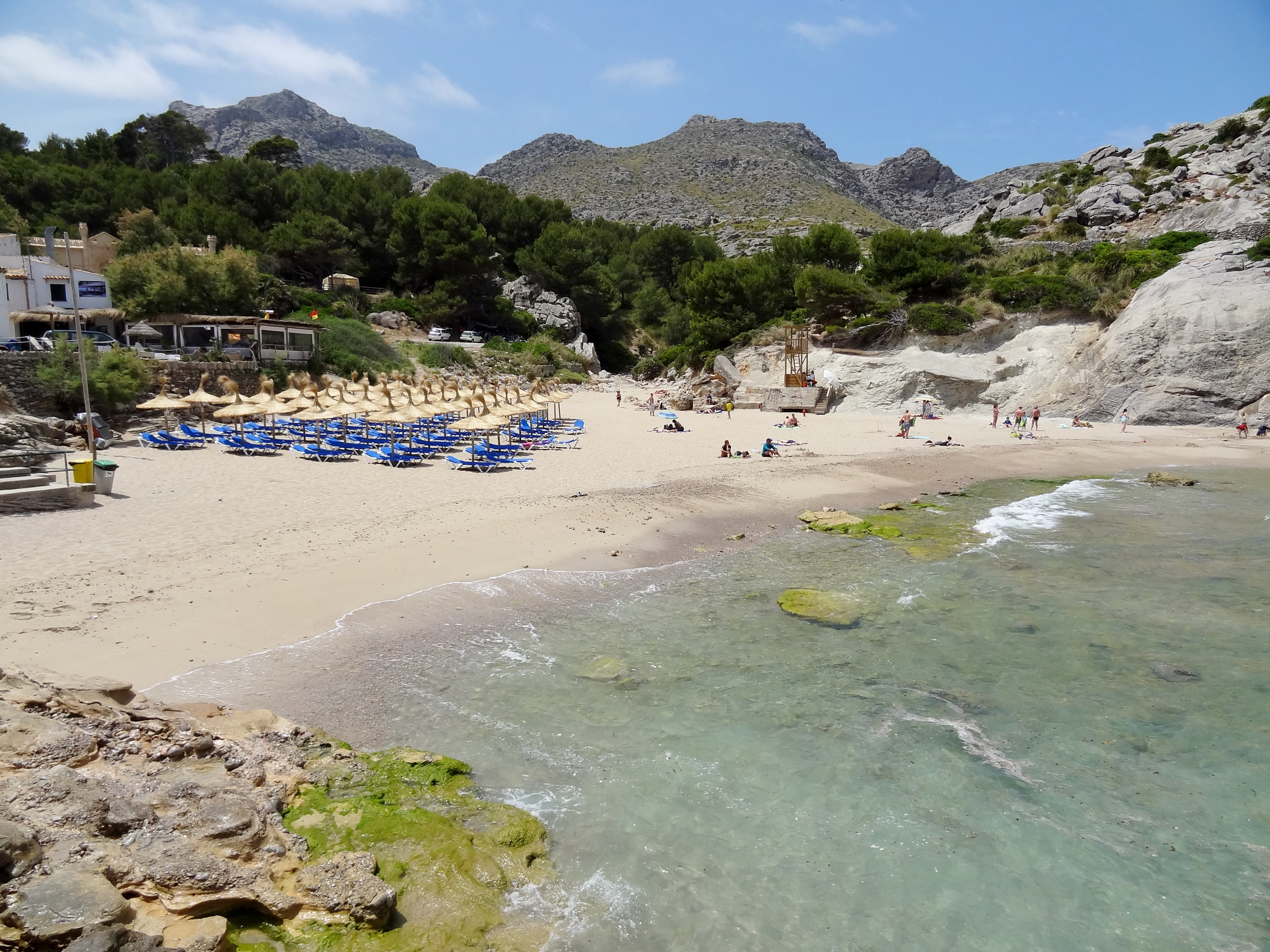 Cala Barques im Ort Cala Sant Vicenç, Gemeinde Pollença, Mallorca, Spanien